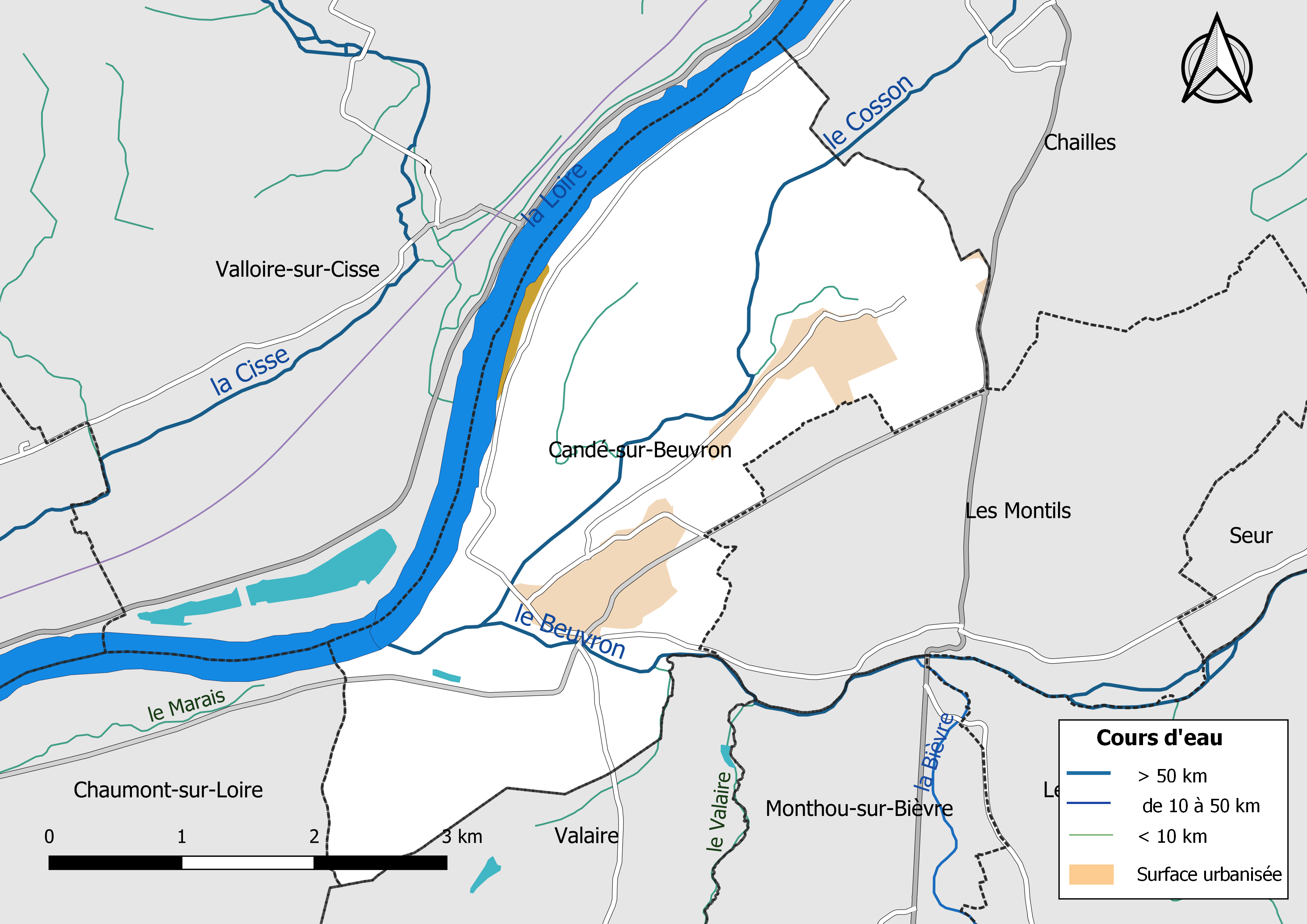 Carte du réseau hydrographique de la commune de Candé-sur-Beuvron (Loir-et-Cher, France).